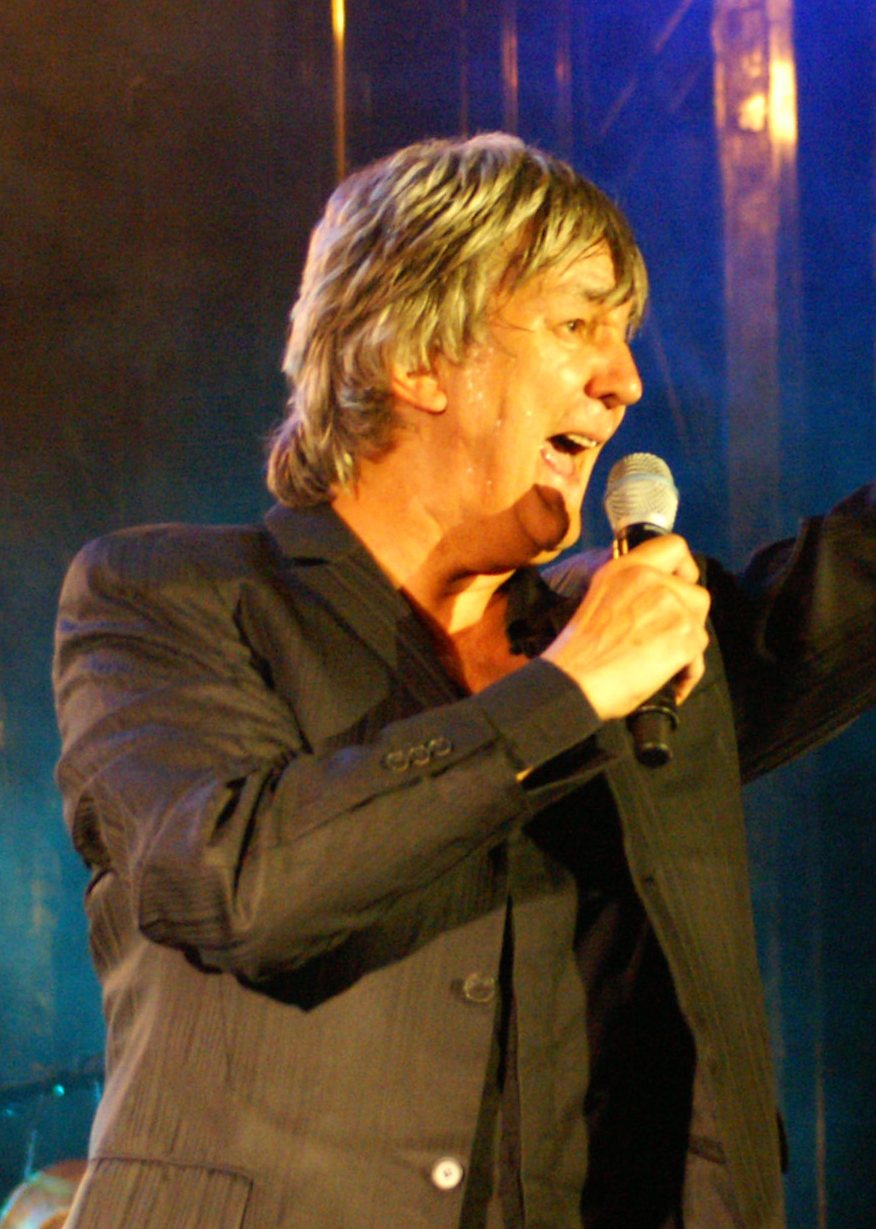 Jacques Higelin, chanteur français à un concert à Auxerre en 2007. Photo recadrée à partir de File:Jacques Higelin 20070721 Auxerre 2.jpg